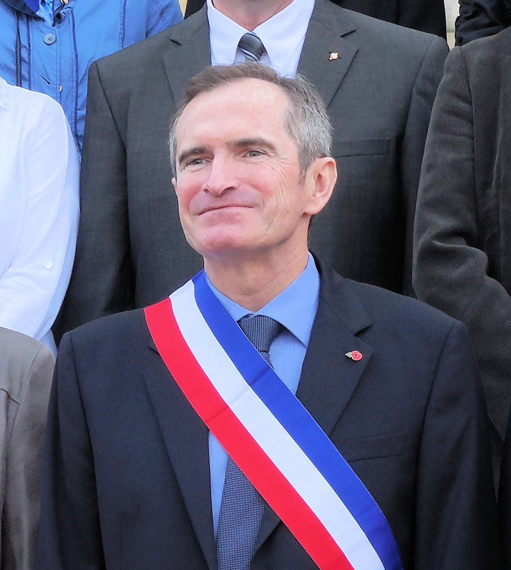 Stéphane Demilly